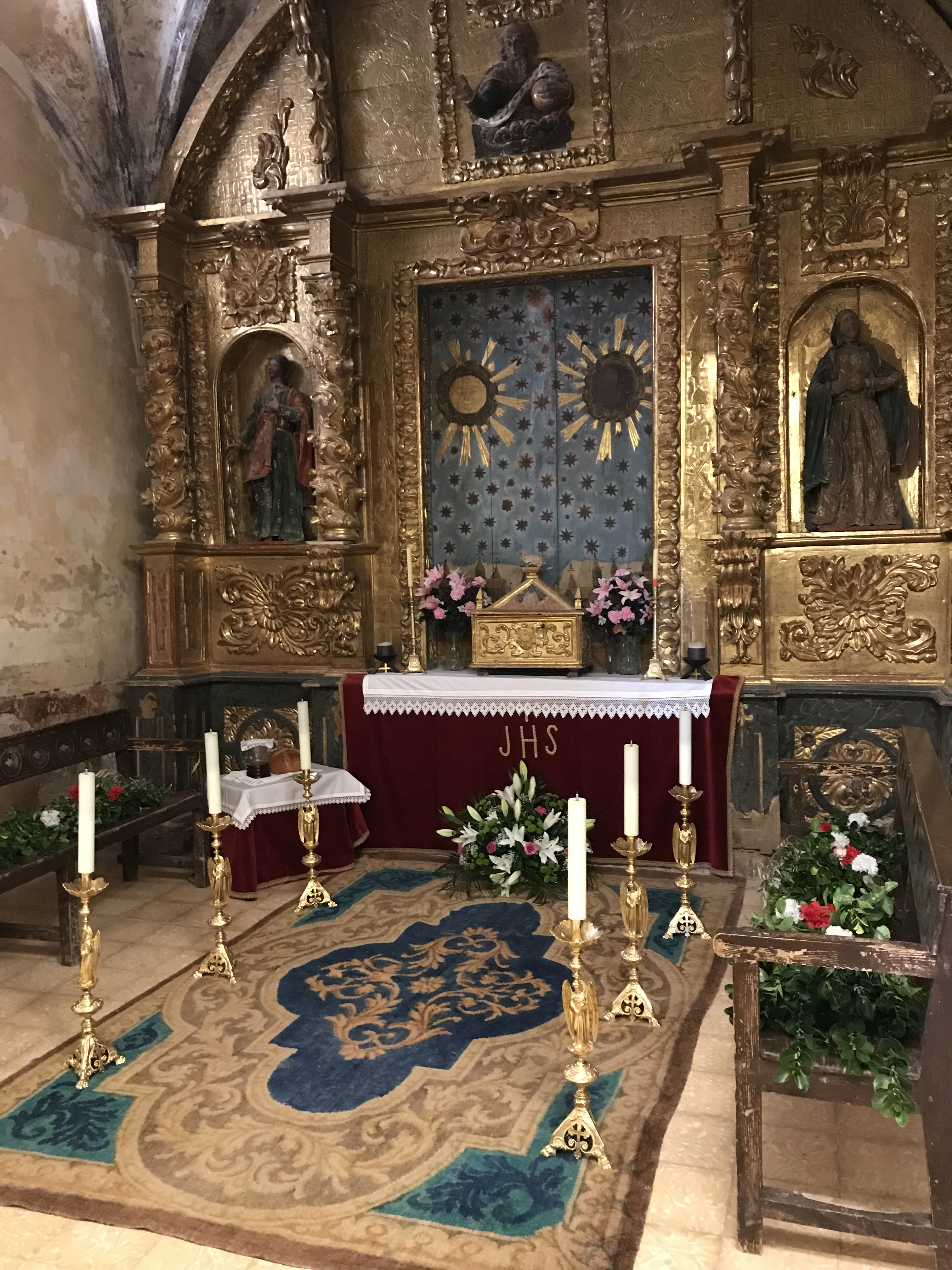 interior iglesia asuncion